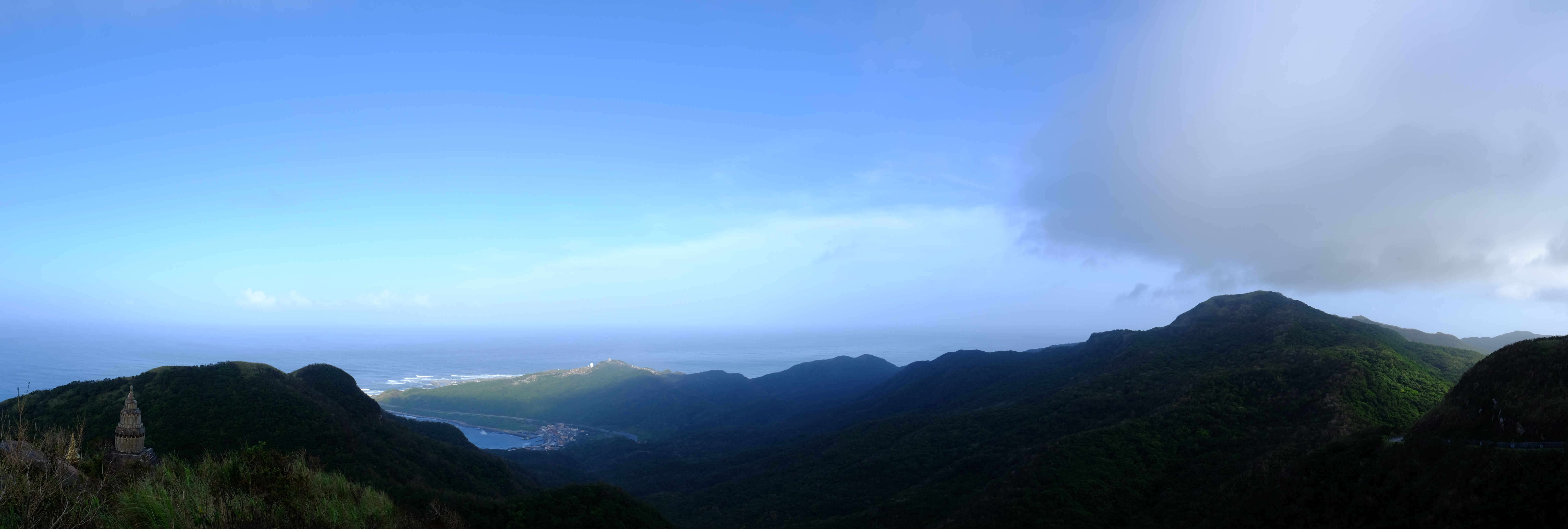 靈鷲山